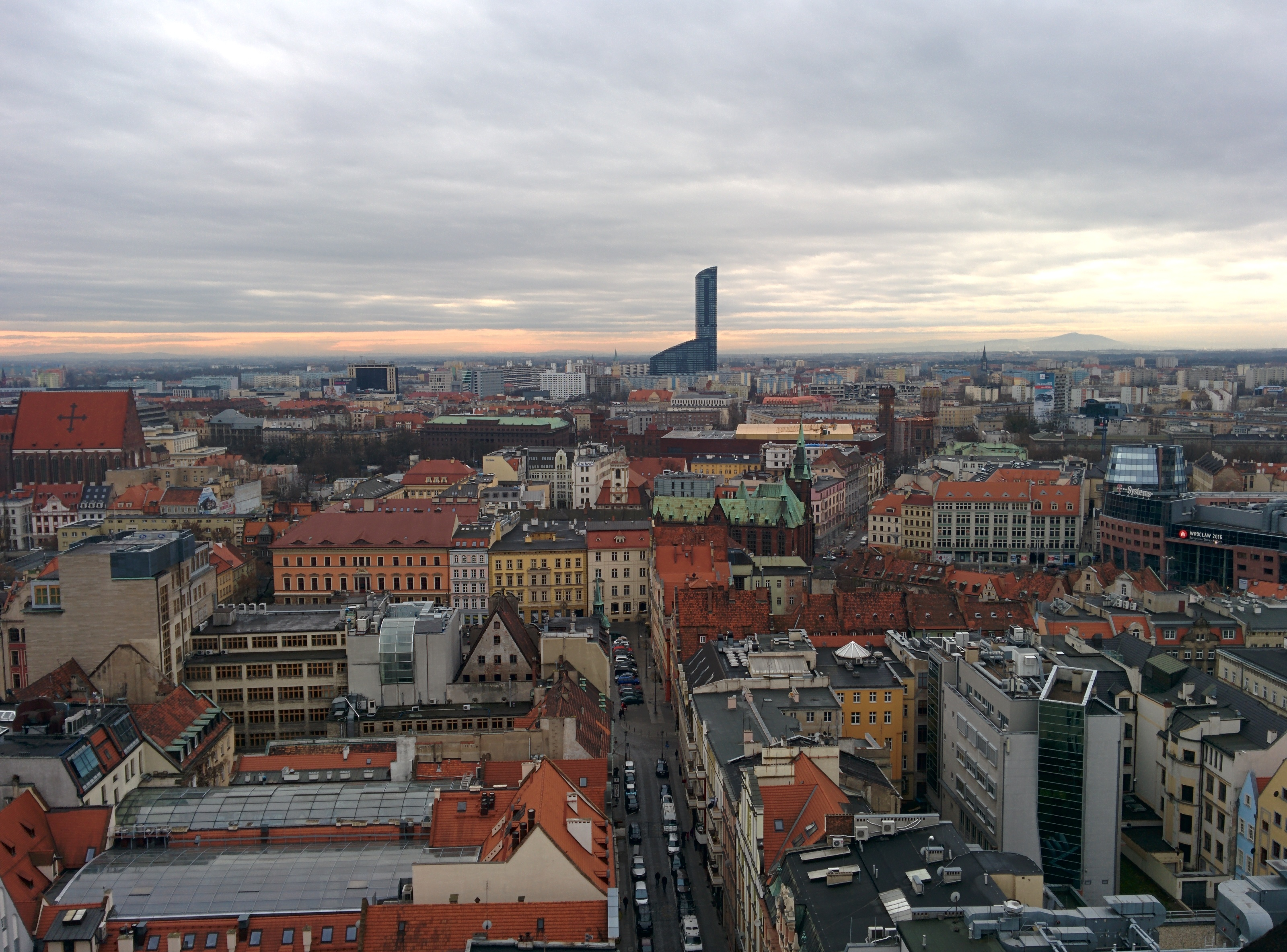 Widok z wieży widokowej Bazyliki Mniejszej p.w. św. Elżbiety we Wrocławiu w kierunku Sky Tower